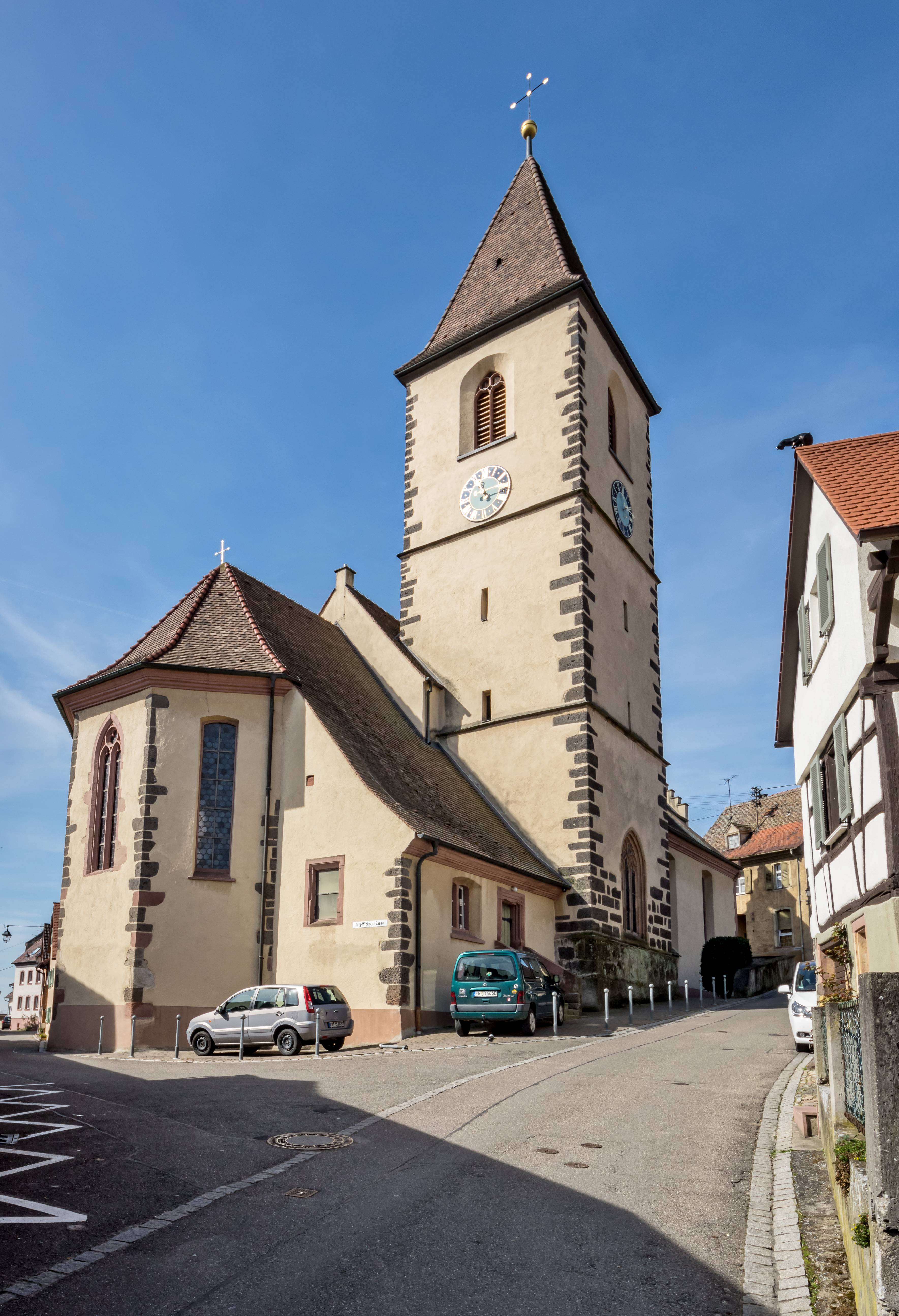 Bilder aus Burkheim am Kaiserstuhl Die Kirche